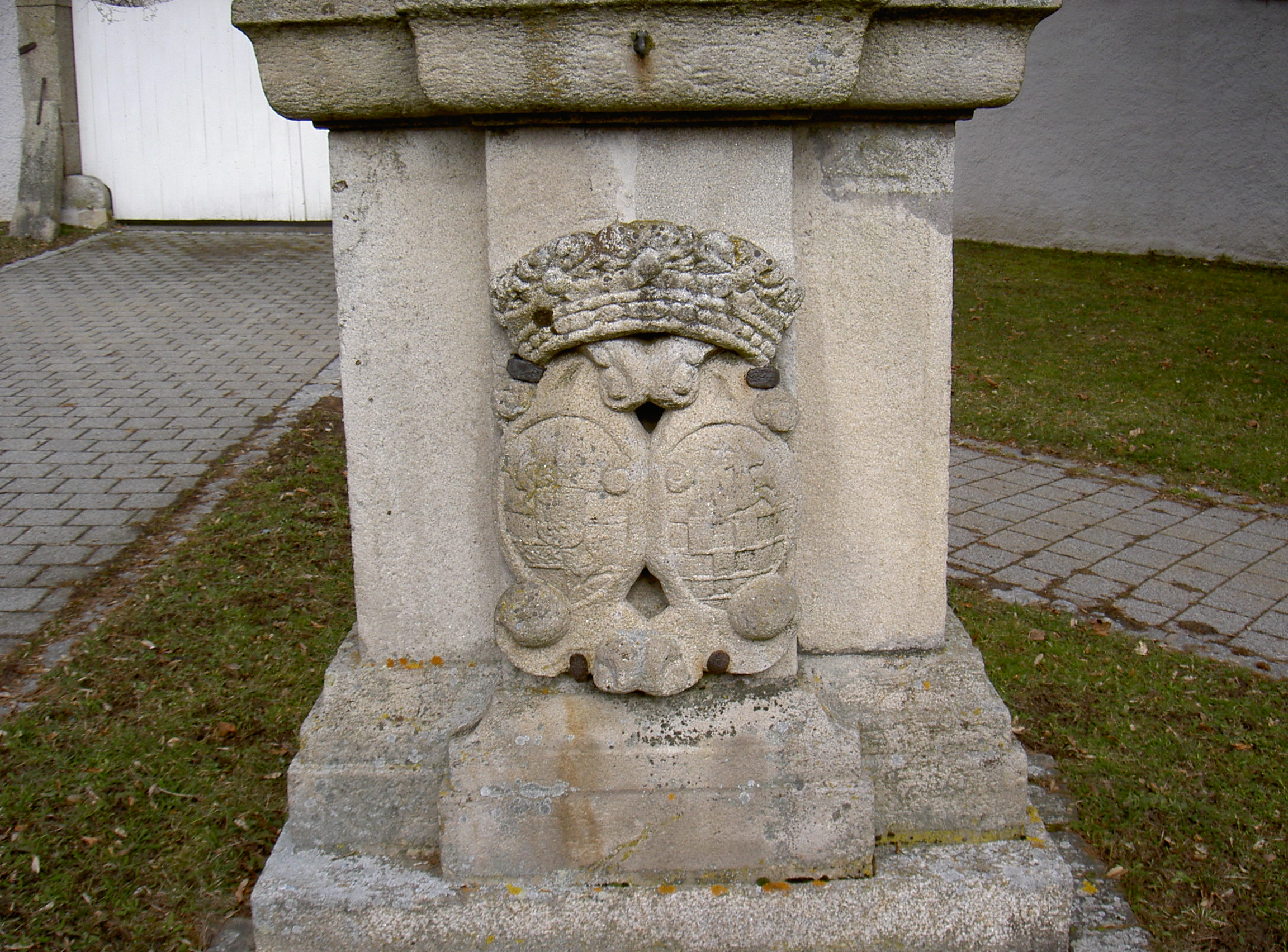 Waldau Figurengruppe auf einer Säule auf dem Platz vor der Kirche und dem Schloss